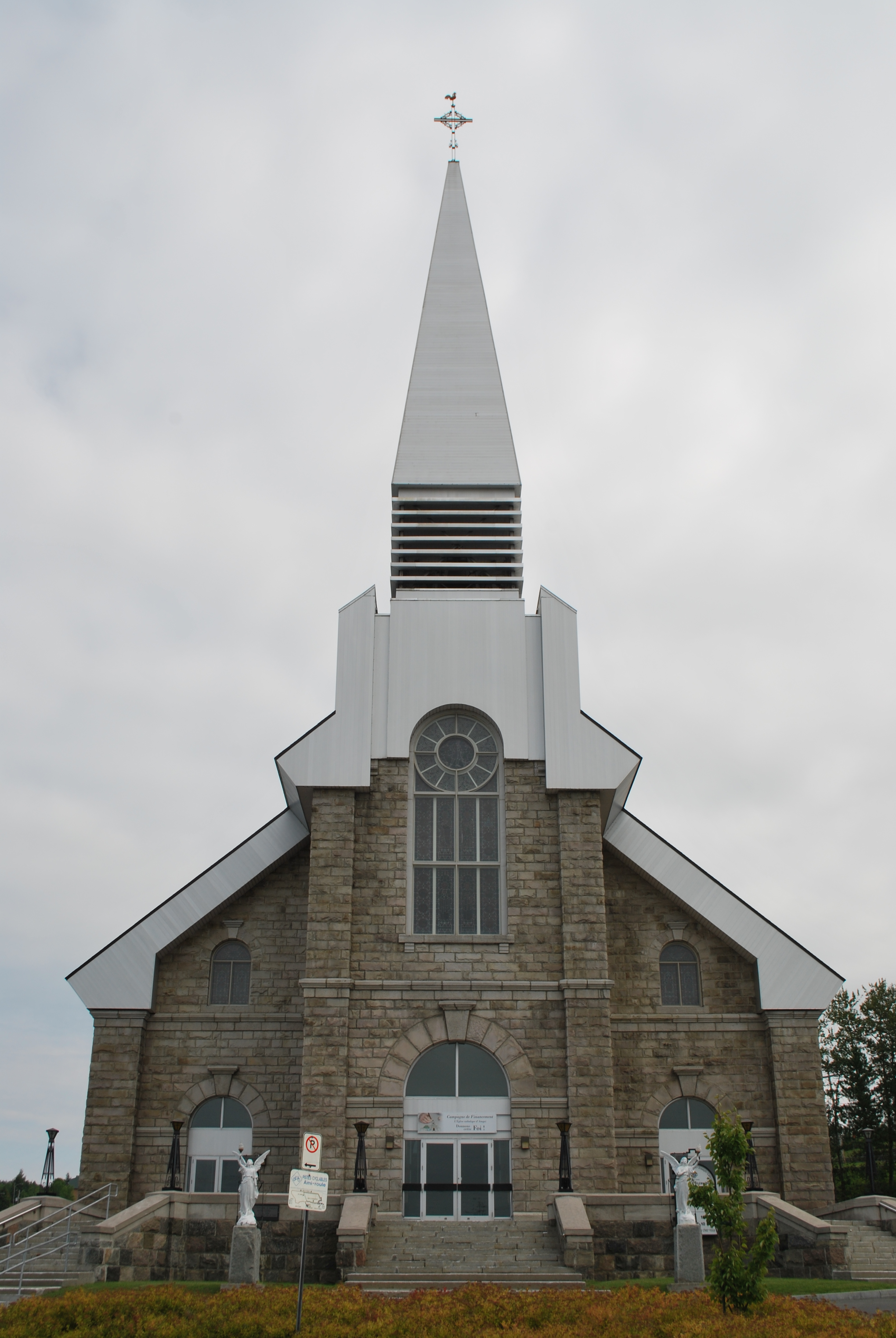 Église d'Amqui, au Québec